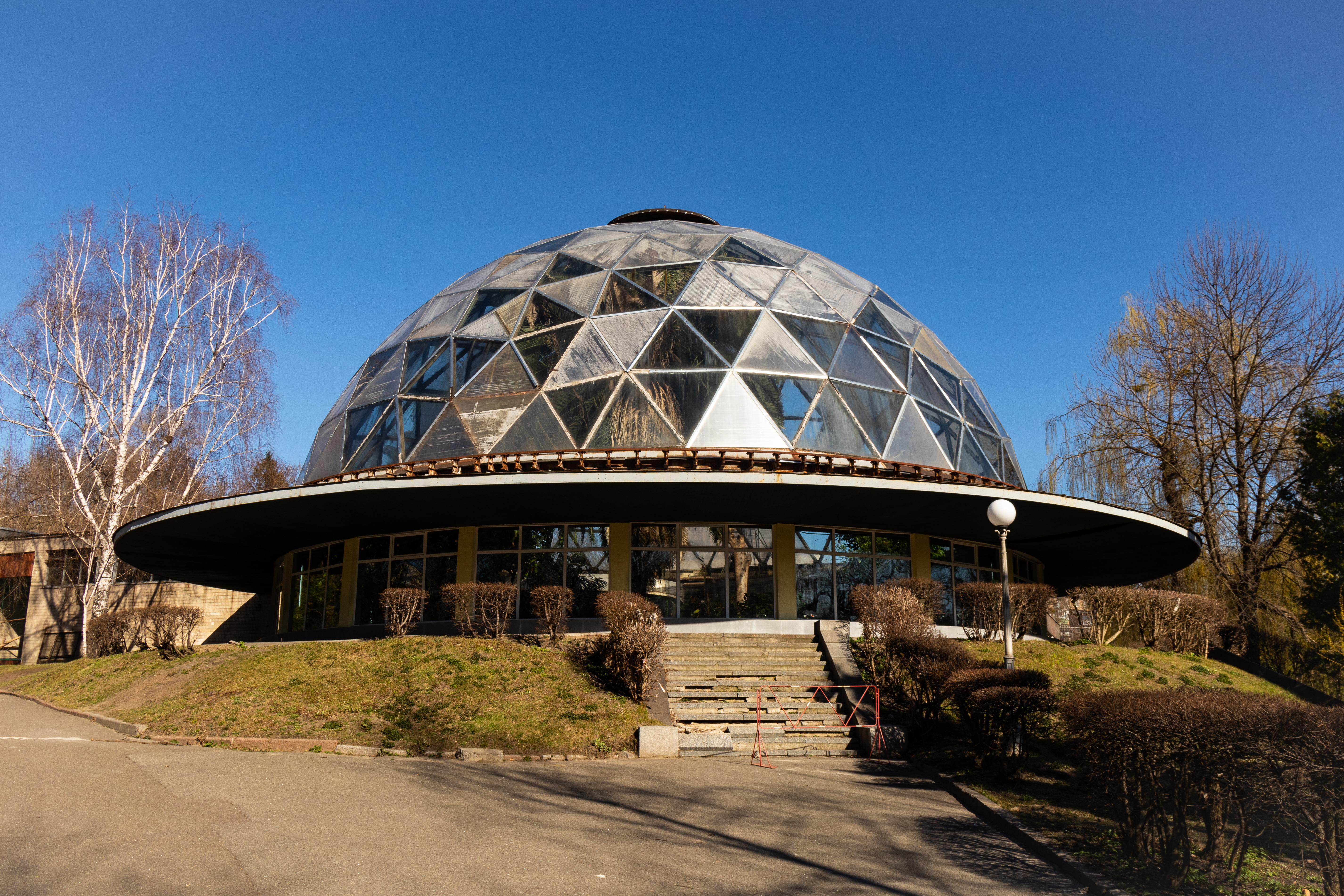 Das Vogel und Palmenhaus des Kiewer Zoos im April 2019. Zu dieser Zeit wurde gerade ein Teil des Zoos saniert.